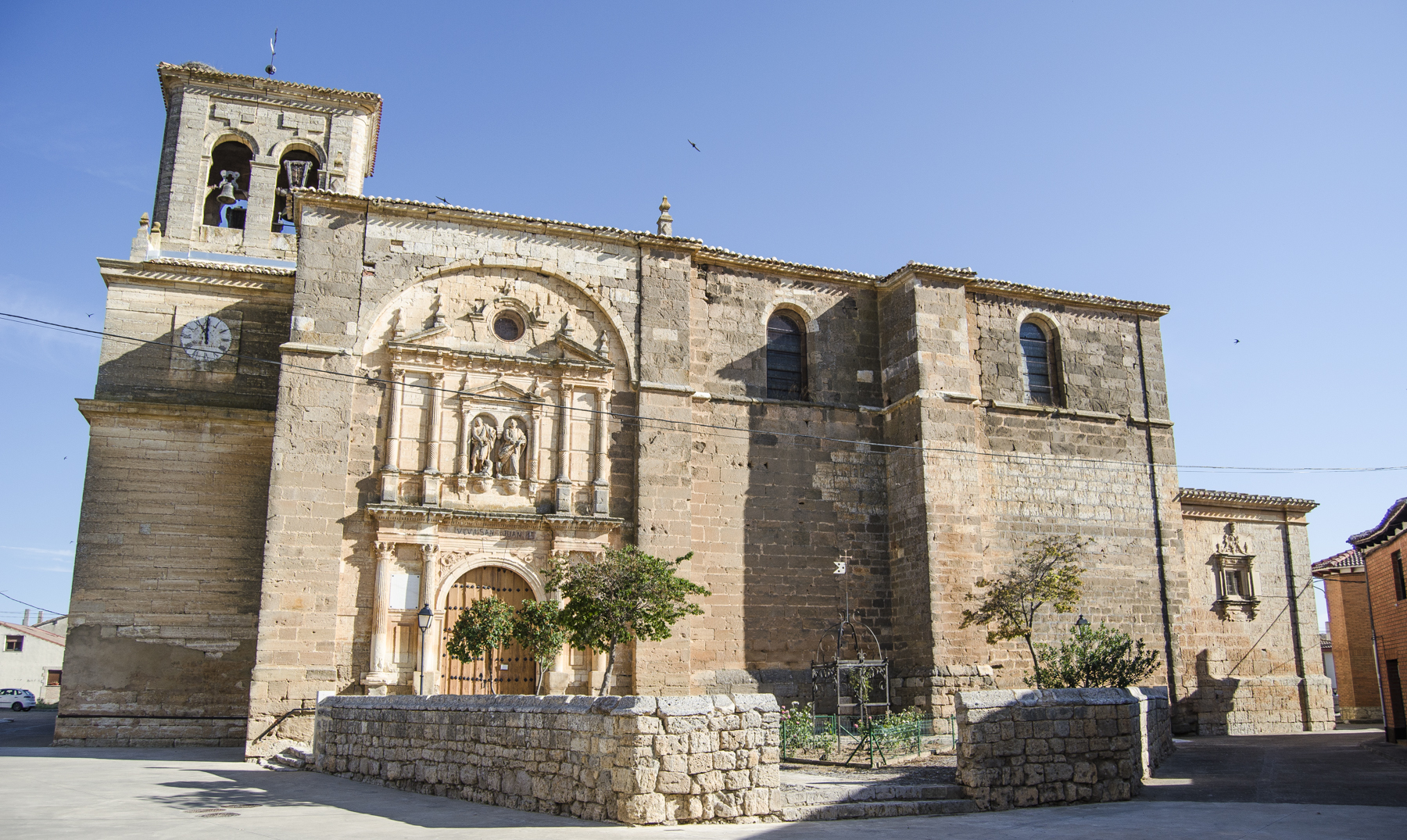 Iglesia de los Santos Juanes. Padilla de Abajo. Julio de 2016.